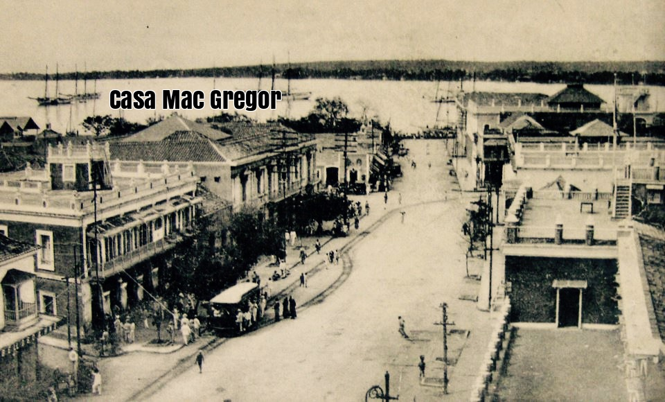 La Casa Mac Gregor, primera tienda por departamentos de Venezuela. Ubicada en el centro de Maracaibo y con vista al puerto internacional de la ciudad.